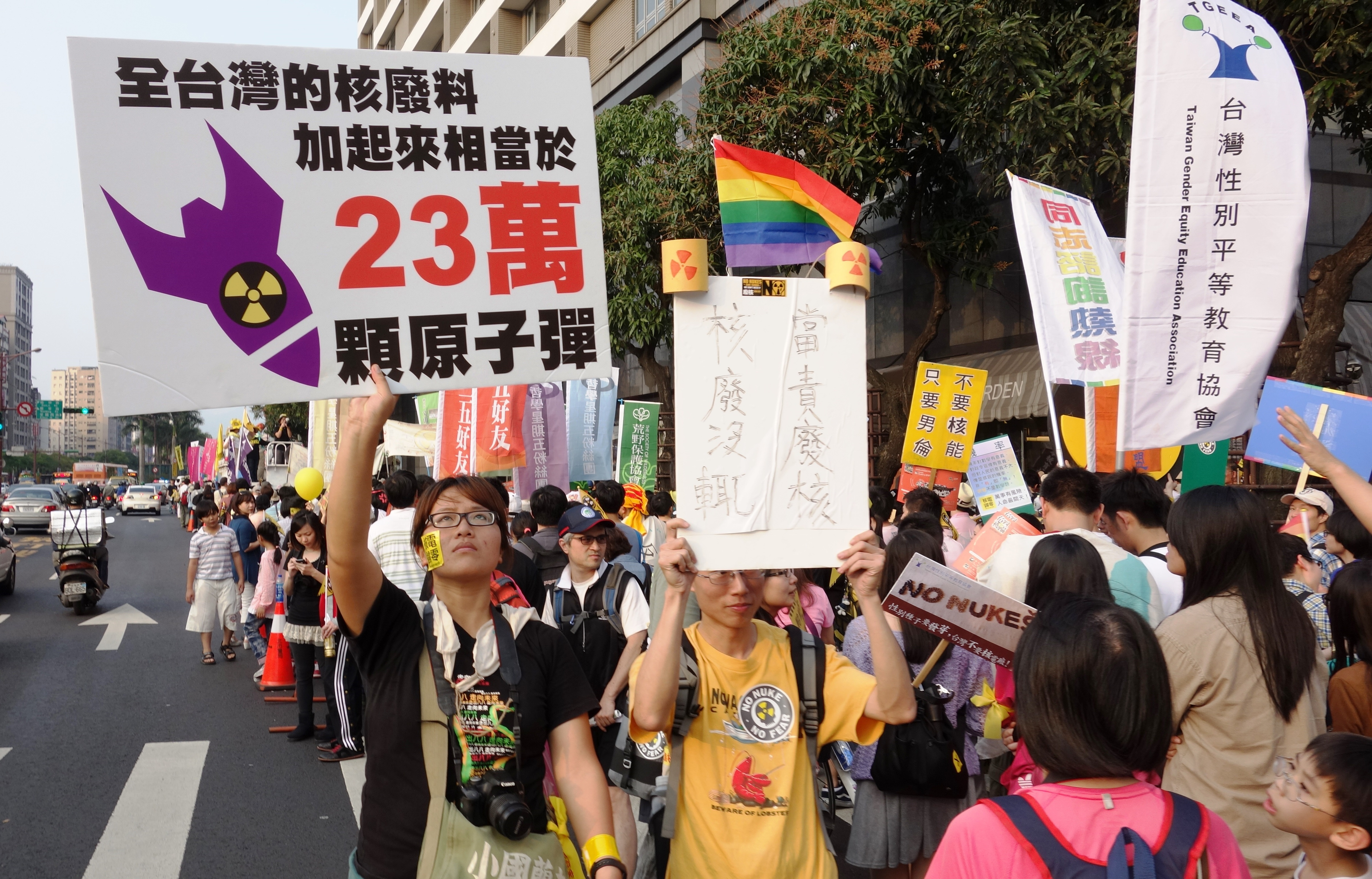 2013年3月9日，309廢核大遊行，遊行群眾舉牌宣稱「全臺灣的核廢料加起來相當於23萬顆原子彈」。但2015年1月26日，核能流言終結者成員黃士修在全國能源會議說，很多反核人士講的核災根本是講核彈引發的核災。